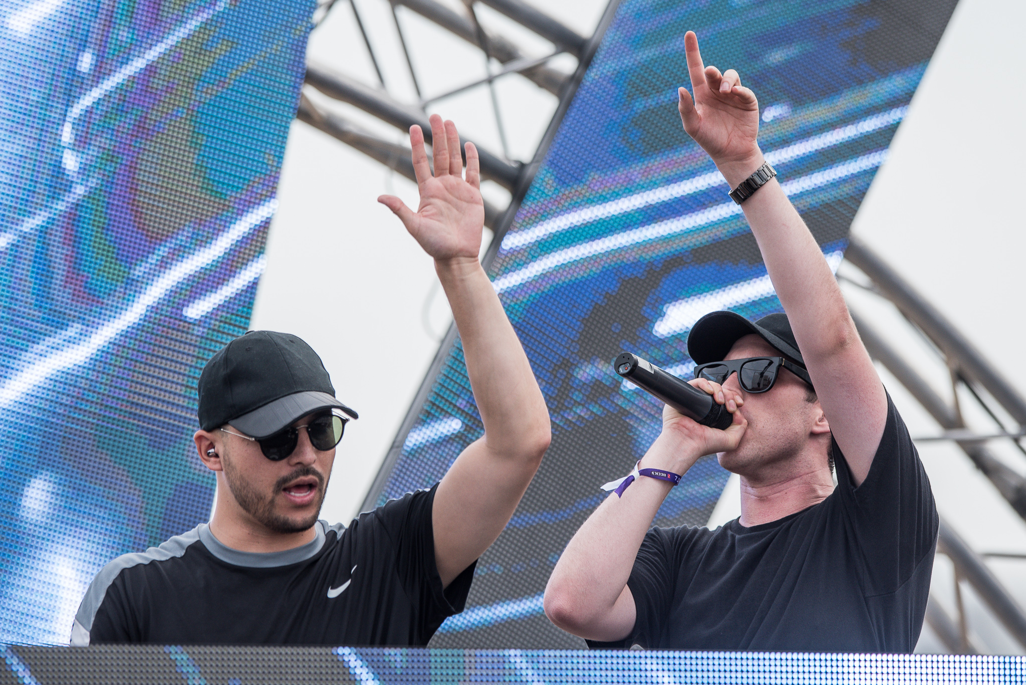 3rd Stage,Festival,Konzert,Livekonzert,Livemusik,Musik,Open Beatz 2016,Slander